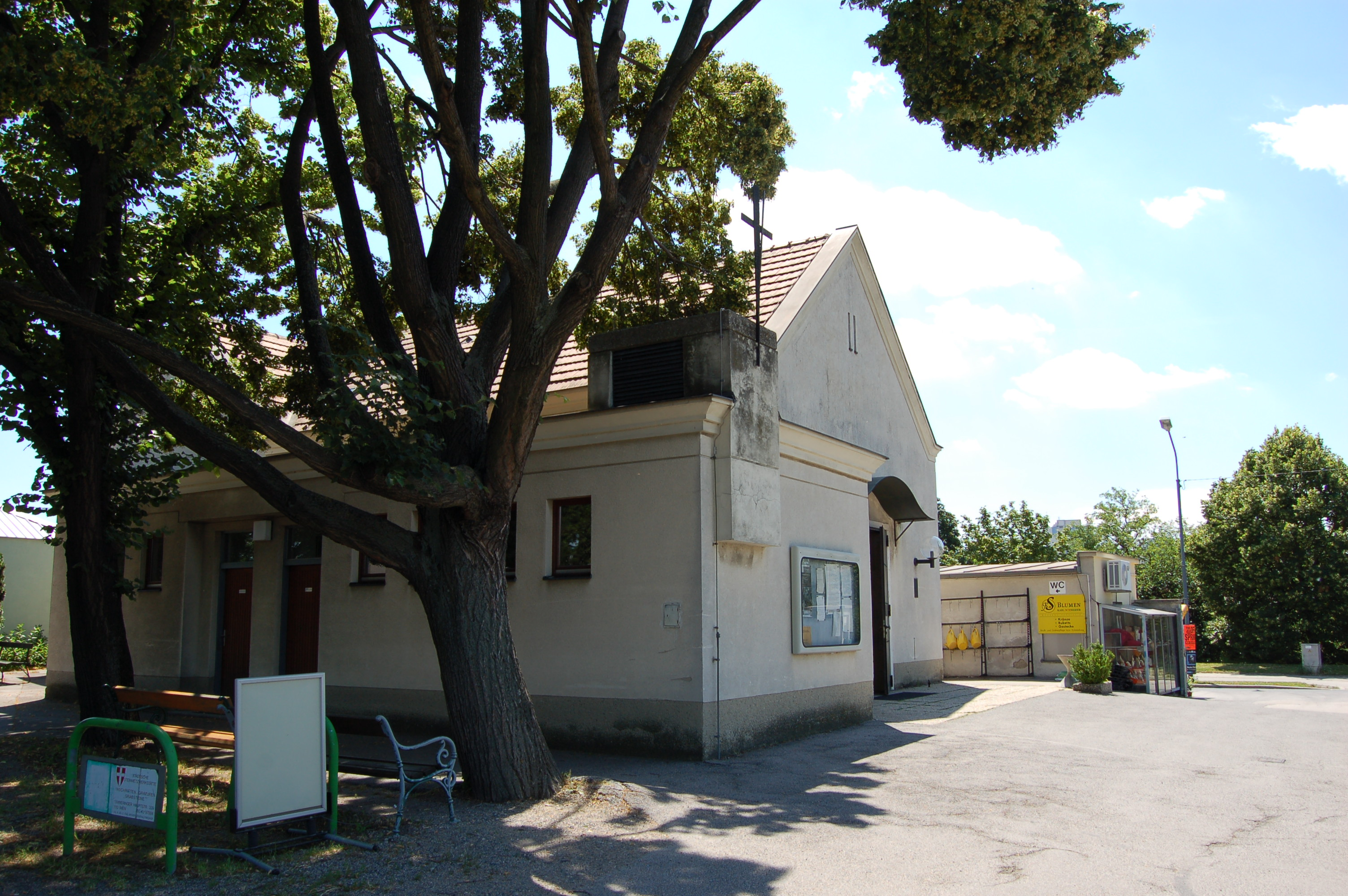 Groß-Jedlersdorfer Friedhof, Aufbahrungshalle